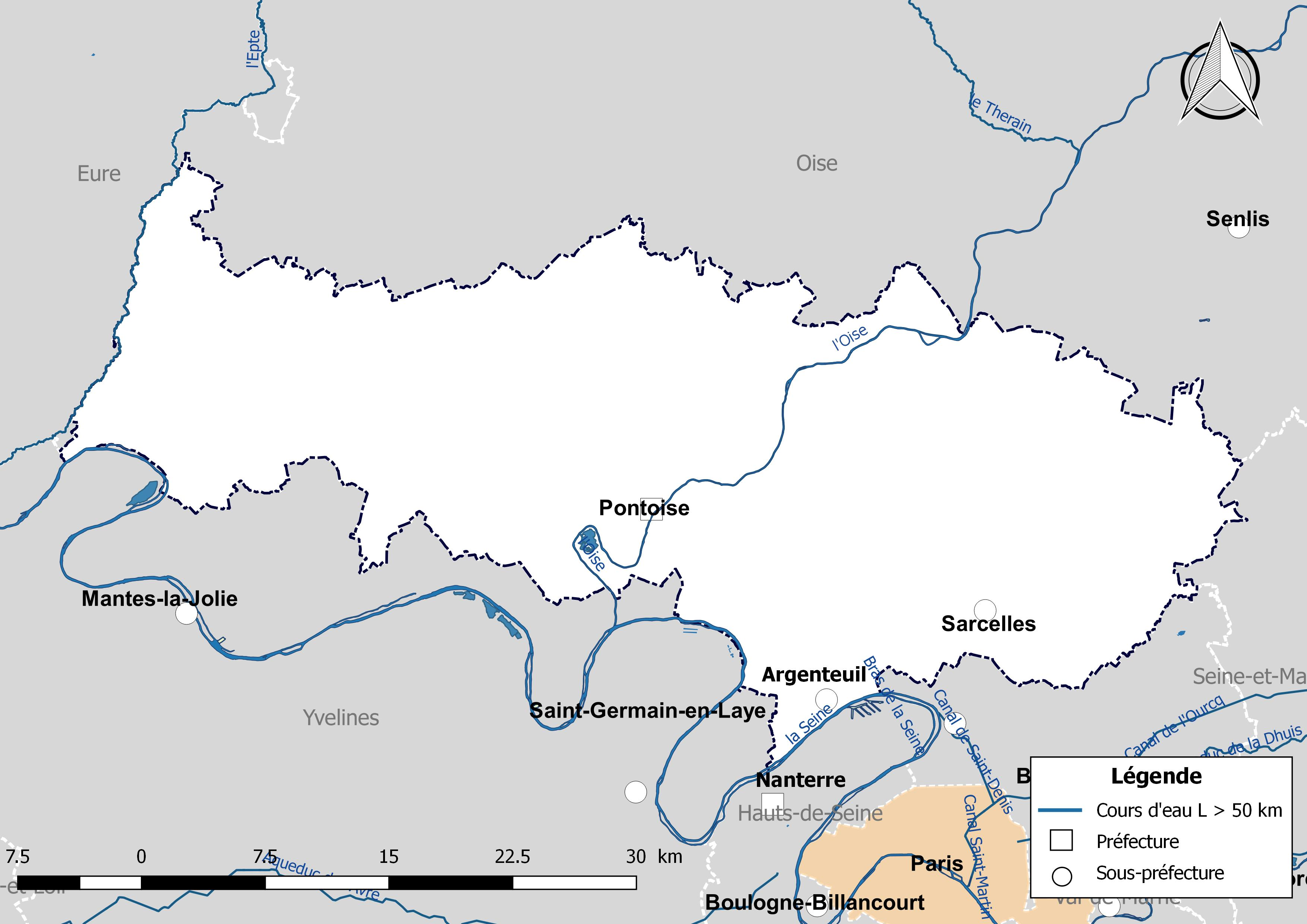 Carte des cours d'eau de longueur supérieure à 50 km drainant le département du Val-d'Oise (France).